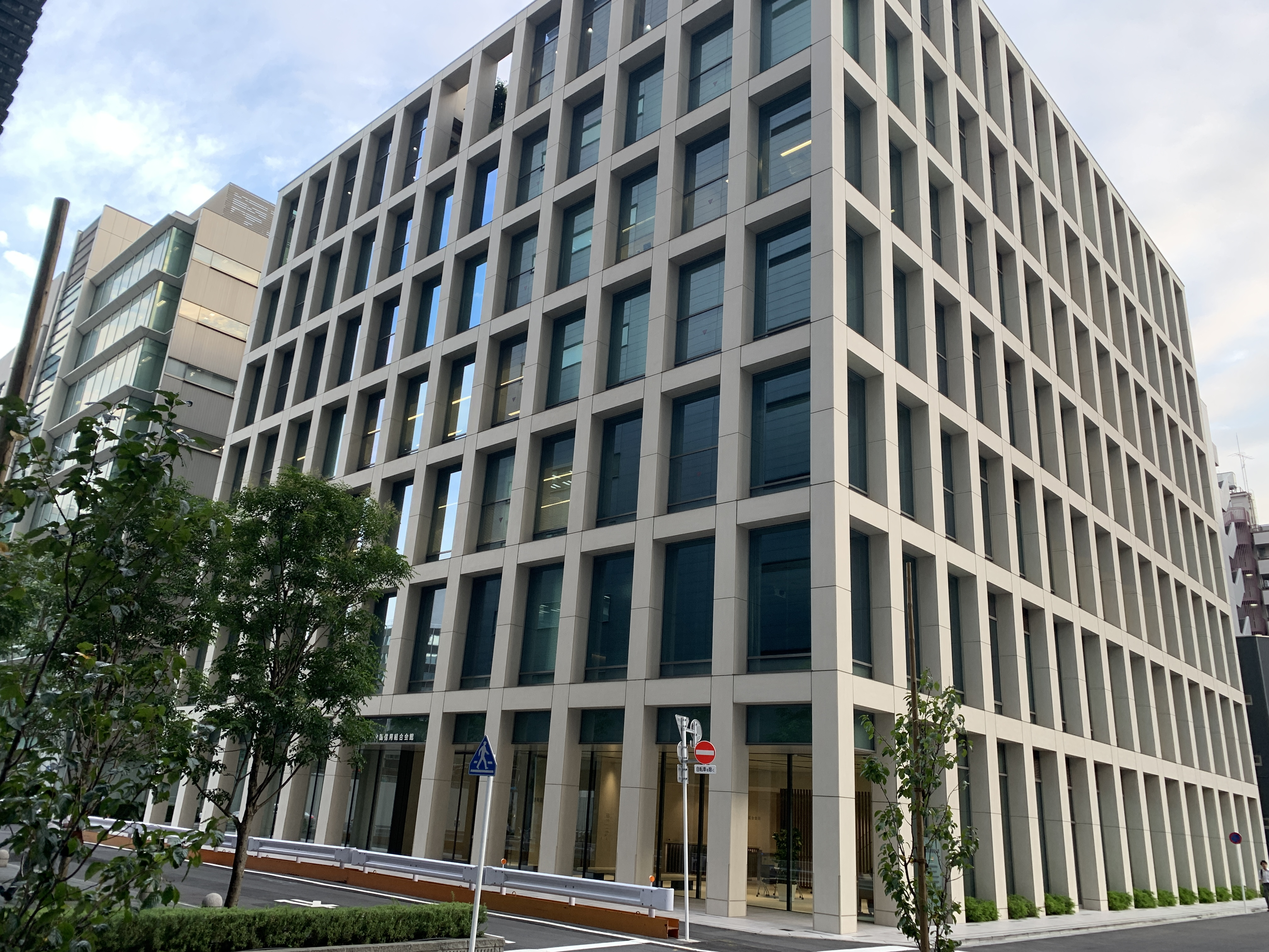 全国信用協同組合連合会本部